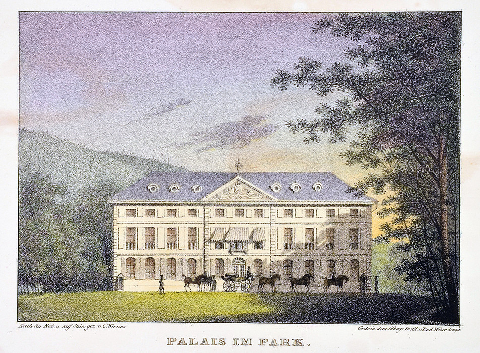 Palais im Park, aus: C. Werner: XII Ansichten von Greiz. (Leipzig, Magazin für Literatur, 1838).